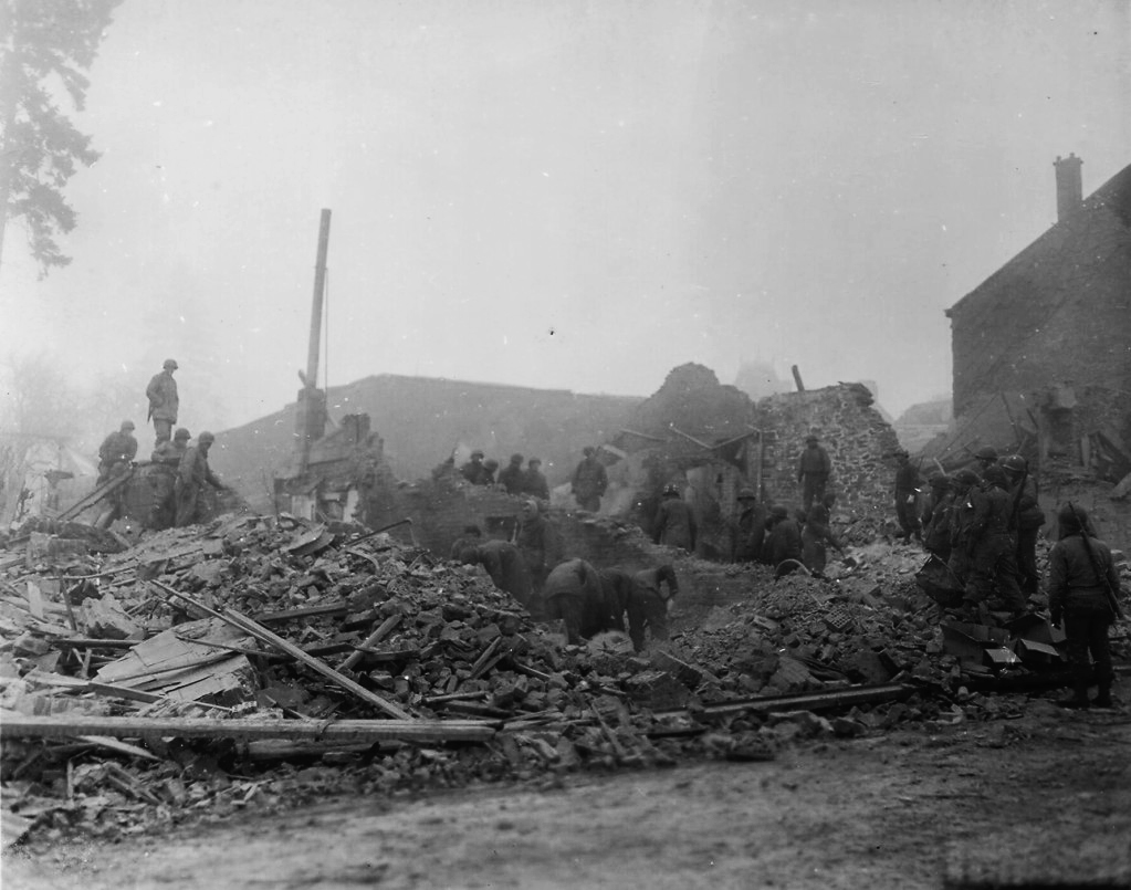 Bastogne, rue de Neufchâteau après la destruction du dispensaire, les soldats américains fouillent les décombres (décembre 1944)